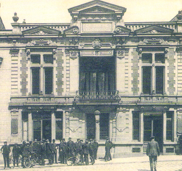 Bureaux du journal la Sarthe à la fin du XIXème siècle